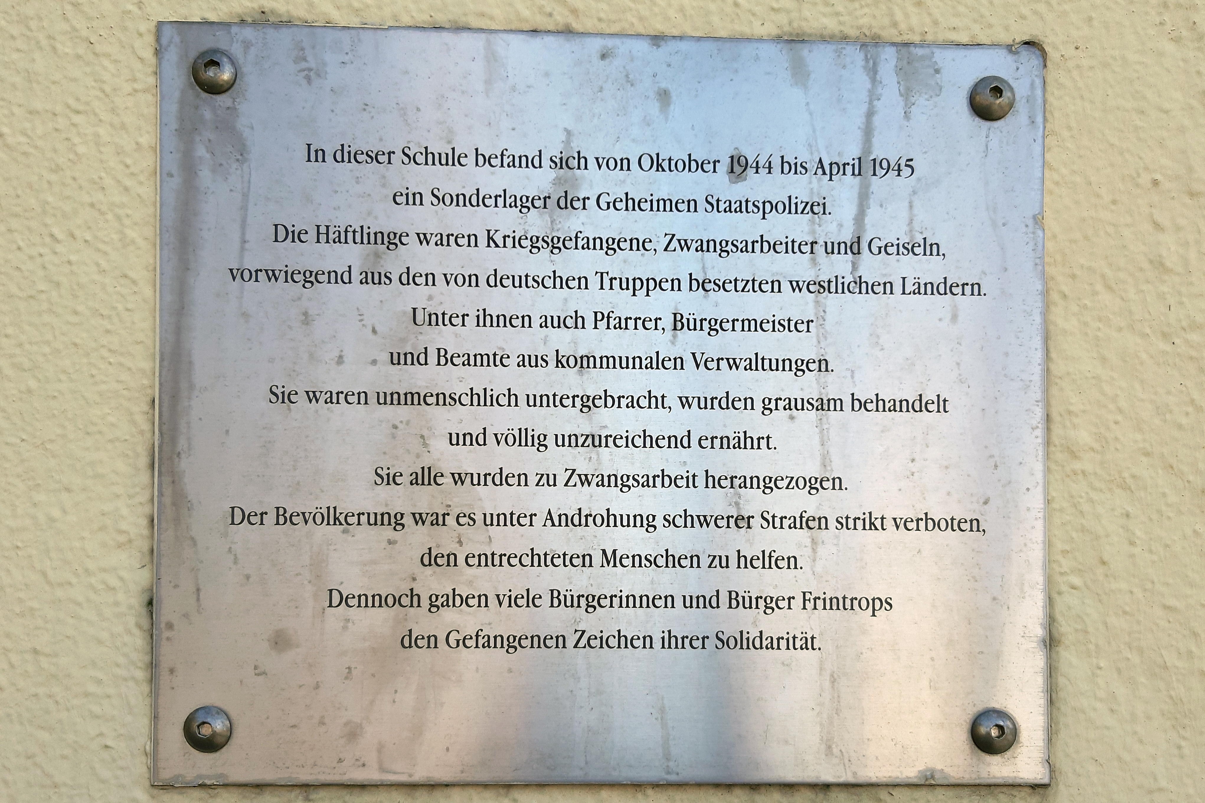 Walter-Pleitgen-Grundschule in Essen-Frintrop, 2013 geschlossen - Erinnerung an das hier untergebrachte Arbeitserziehungslager im Zweiten Weltkrieg